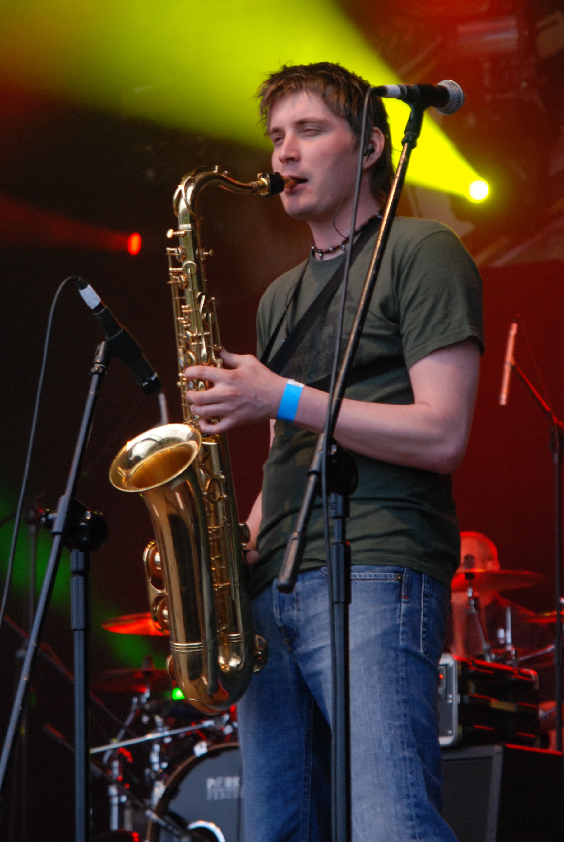 Przemysław Zwias podczas koncertu plenerowego na Lotnisku Muchowiec w Katowicach. Juwenalia Śląskie 17.05.2008r .